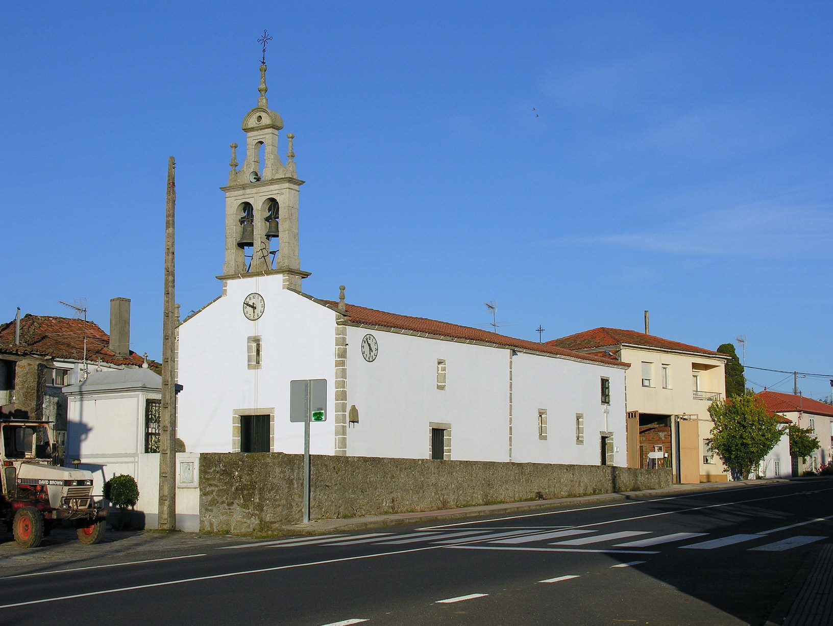 Boente, Concello de Arzúa, Galiza